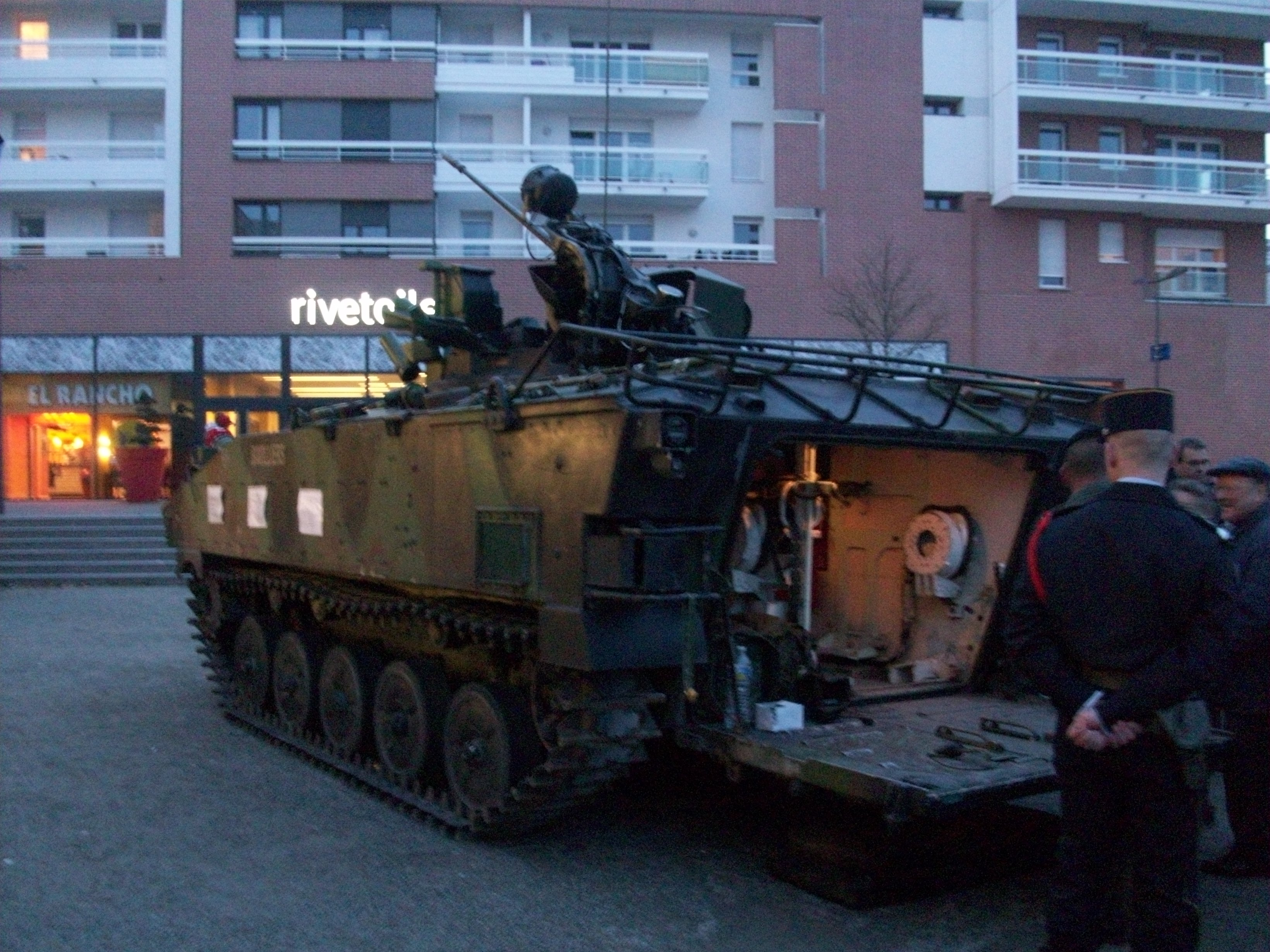 Présentation de véhicules de l'armée française devant Rivétoile, Strasbourg